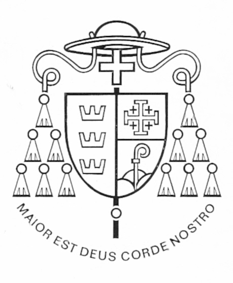 Wappen des ernannten Weihbischofs von Köln, Peter Nettekoven (+ 1975) Symbole in den drei Feldern: Köln (Heimatdiözese), Altenberg (Zentrum der kath. Jugendarbeit in Deutschland) und das Heilige Land